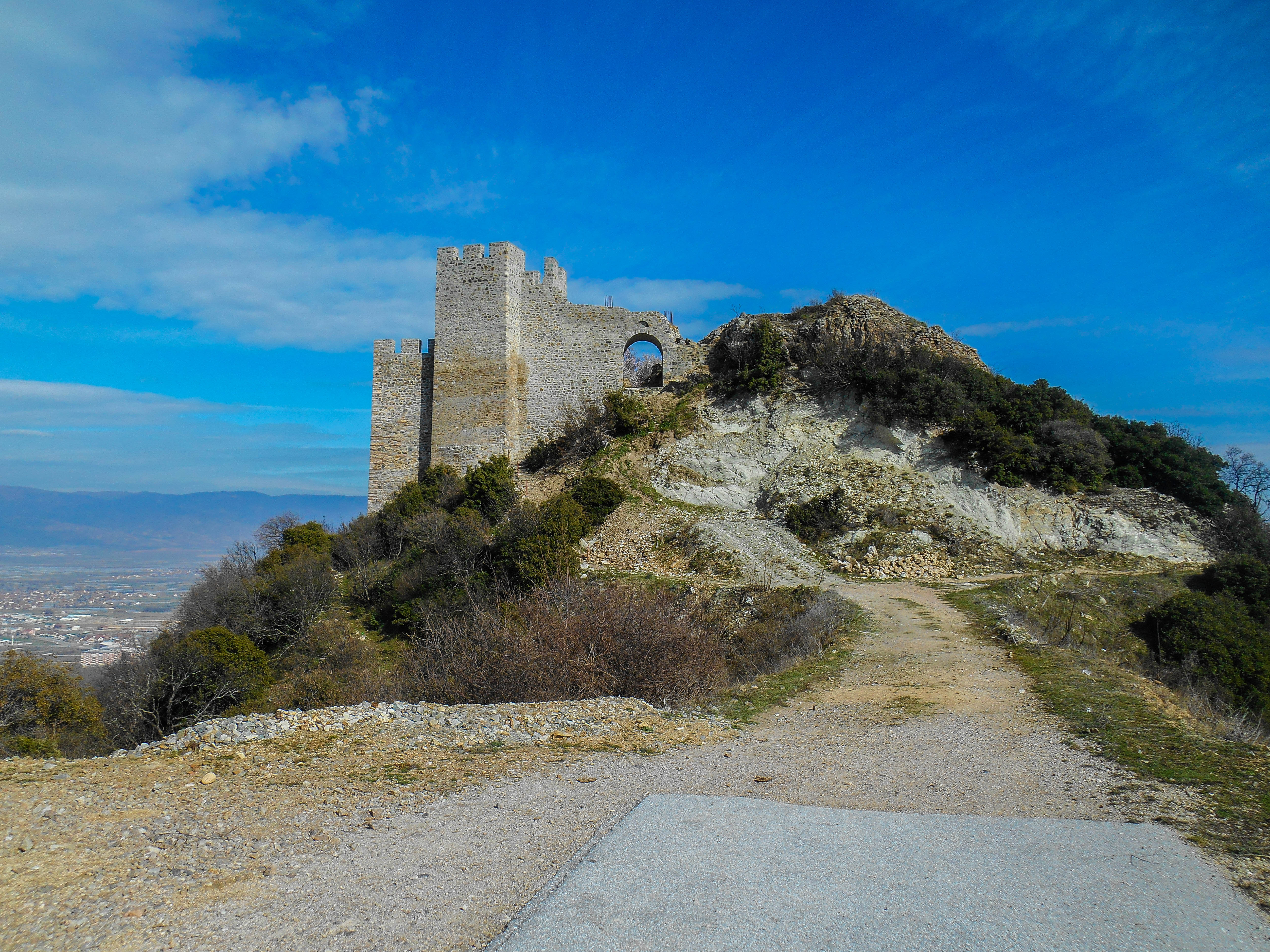 Цареви кули